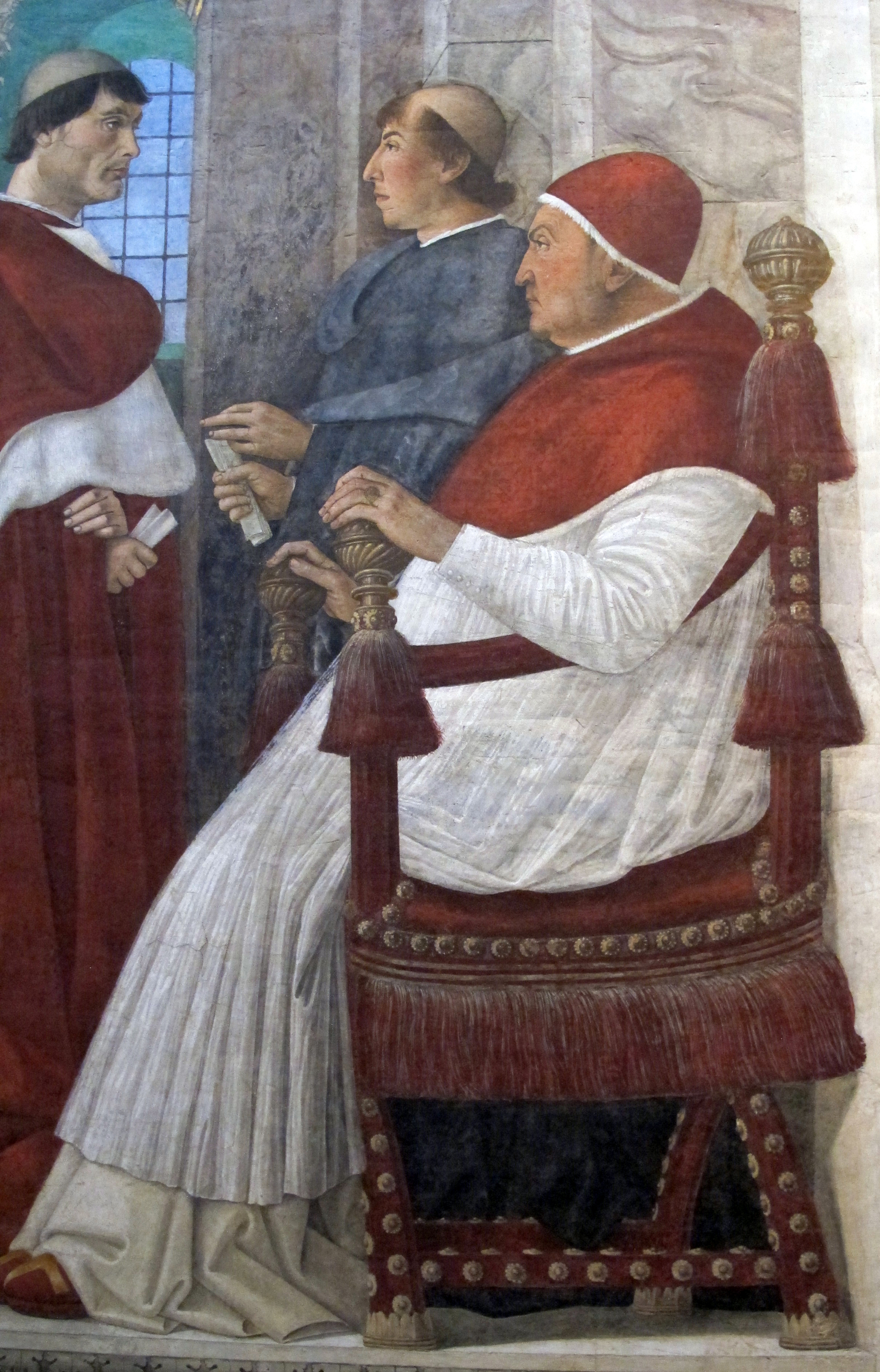 Pinacoteca Vaticana